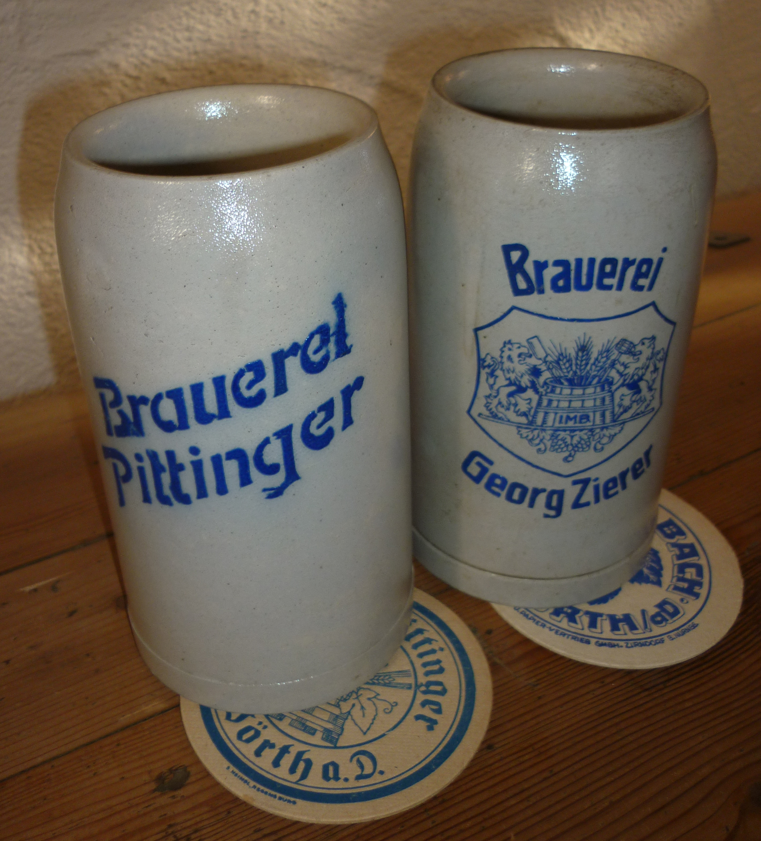 Brauereimaßkrüge Pittinger und Zierer Wörth Donau